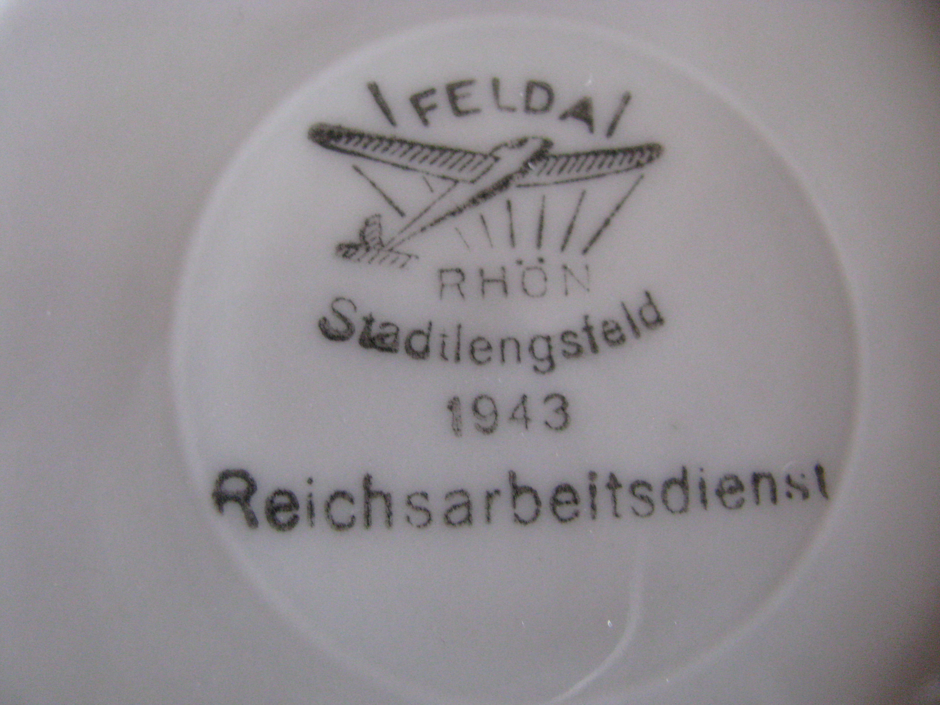 Untertasse - Manufaktur: Felda / Stadtlengsfeld, Reichsarbeitsdienst 1943